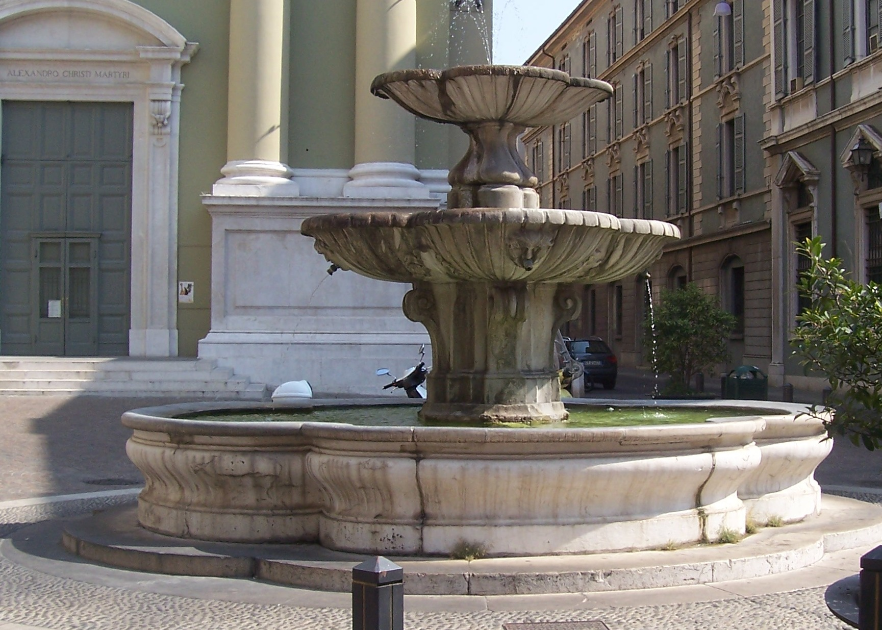 sant'alessandro (brescia) fontana.jpg